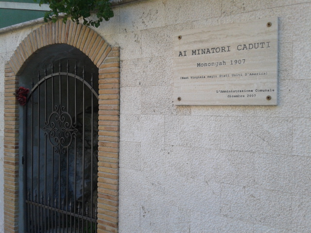 Targa commemorativa dedicata alle vittime di Monongah